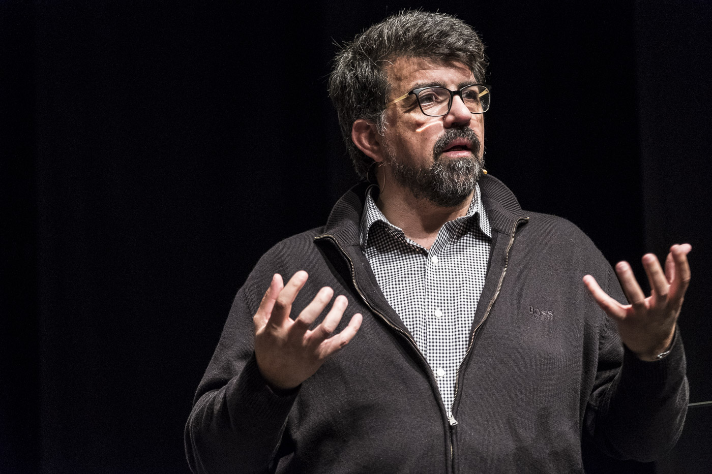 Catosfera 2016 - 13-10-2016